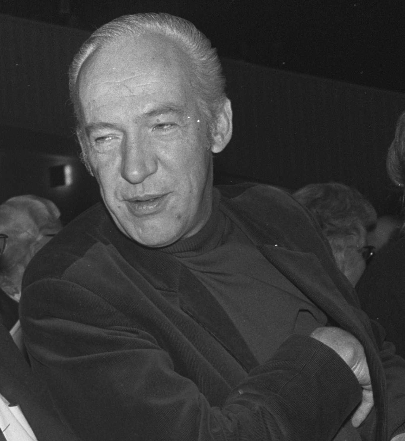 Collectie / Archief : Fotocollectie Anefo Reportage / Serie : [ onbekend ] Beschrijving : Algemene ledenvergadering van de VPRO in Congresgebouw Den Haag Frans de Smit (links) en Gijs Stappershoef Datum : 14 december 1968 Locatie : Den Haag, Zuid-Holland Trefwoorden : ledenvergaderingen Persoonsnaam : Gijs Stappershoef Instellingsnaam : Congresgebouw, VPRO Fotograaf : Koch, Eric / Anefo Auteursrechthebbende : Nationaal Archief Materiaalsoort : Negatief (zwart/wit) Nummer archiefinventaris : bekijk toegang 2.24.01.05 Bestanddeelnummer : 921-9388